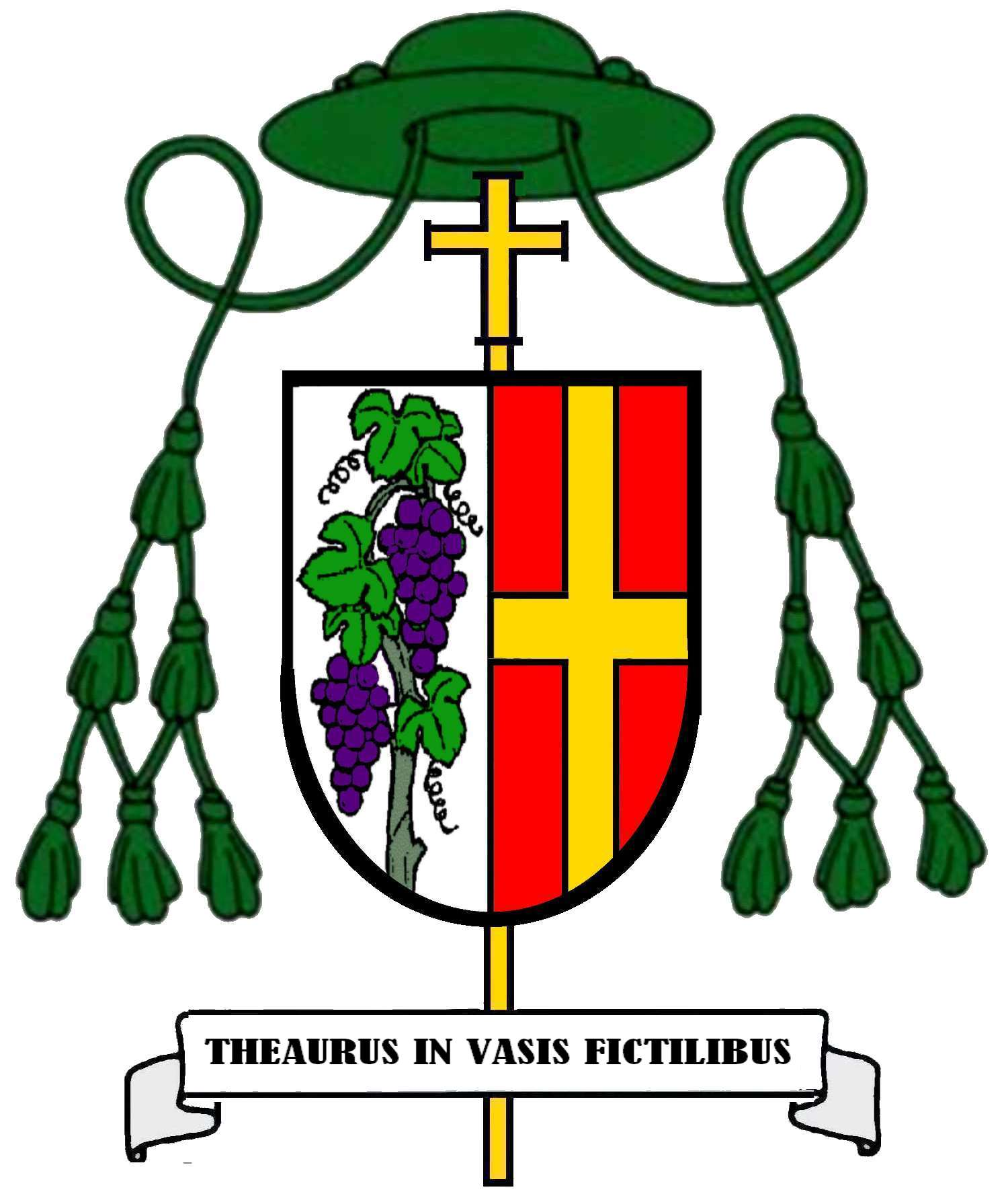 Wappen Heinz Josef Algermissen (* 15. Februar 1949) Weihbischof in Paderborn 1996-2001)